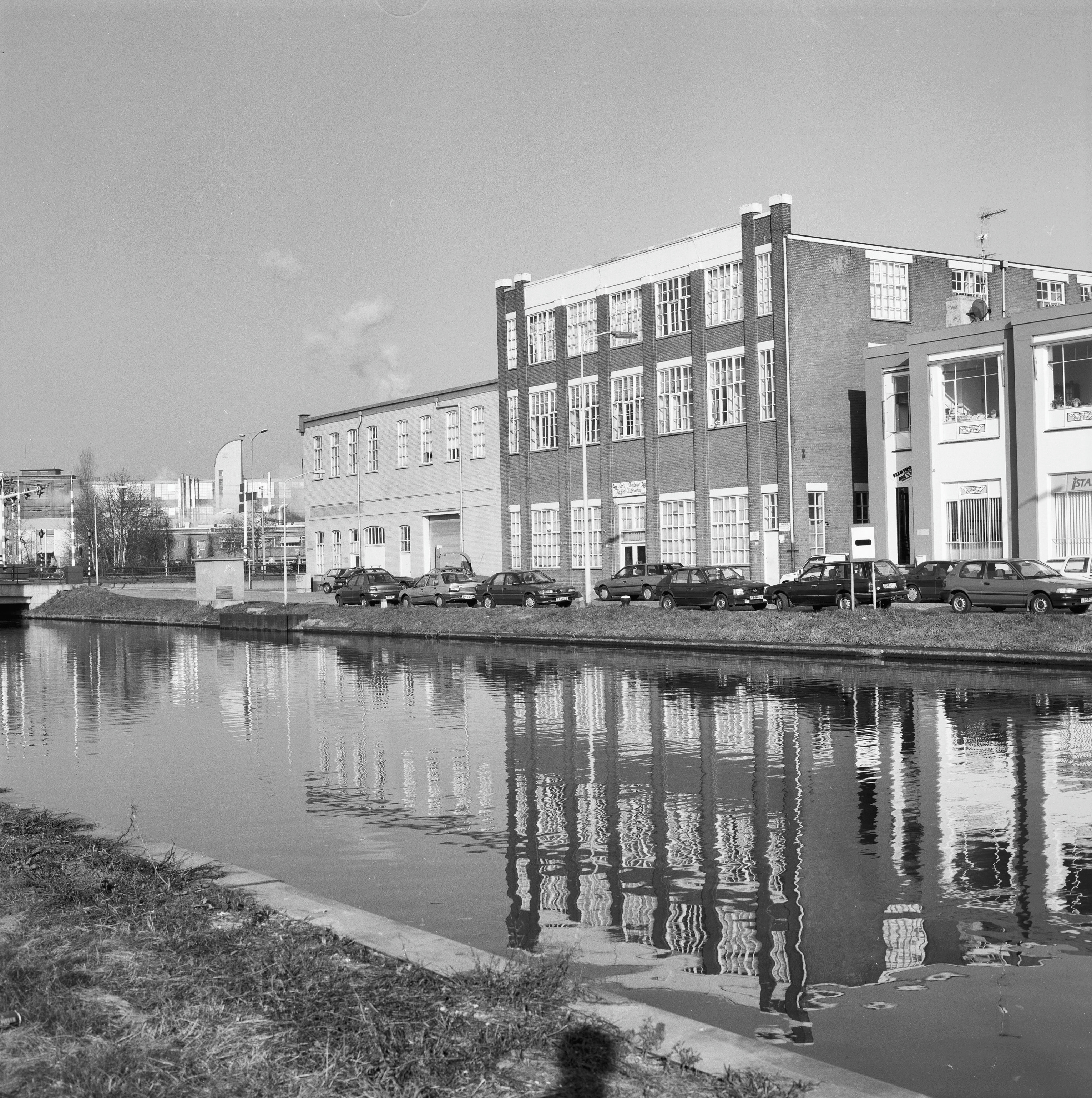 Helmondse Cacao En Chocoladefabriek: Exterieur OVERZICHT GEVELS